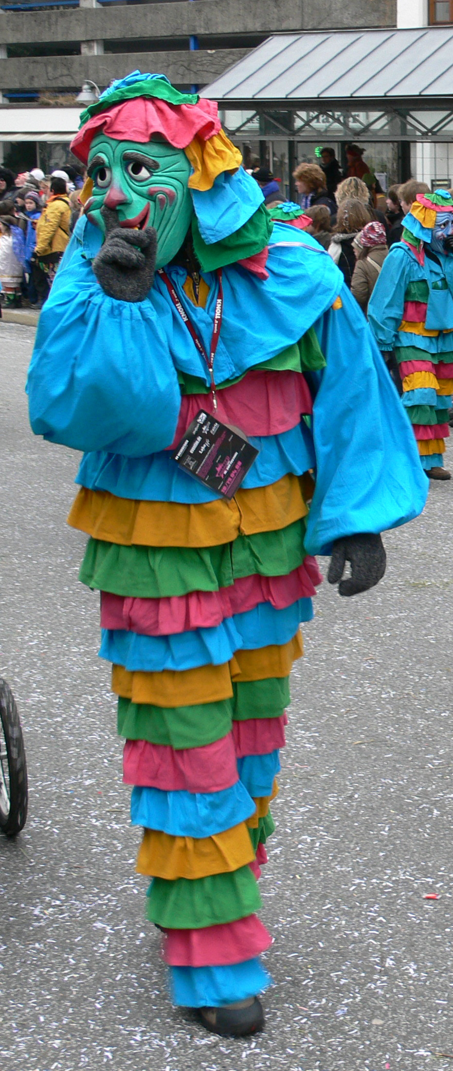 Narrensprung am Fasnetsmontag, 4. Februar 2008 in Ravensburg: Rambassler der Narrenzunft Rambassler, Unterwaldhausen (Kr. Ravensburg)